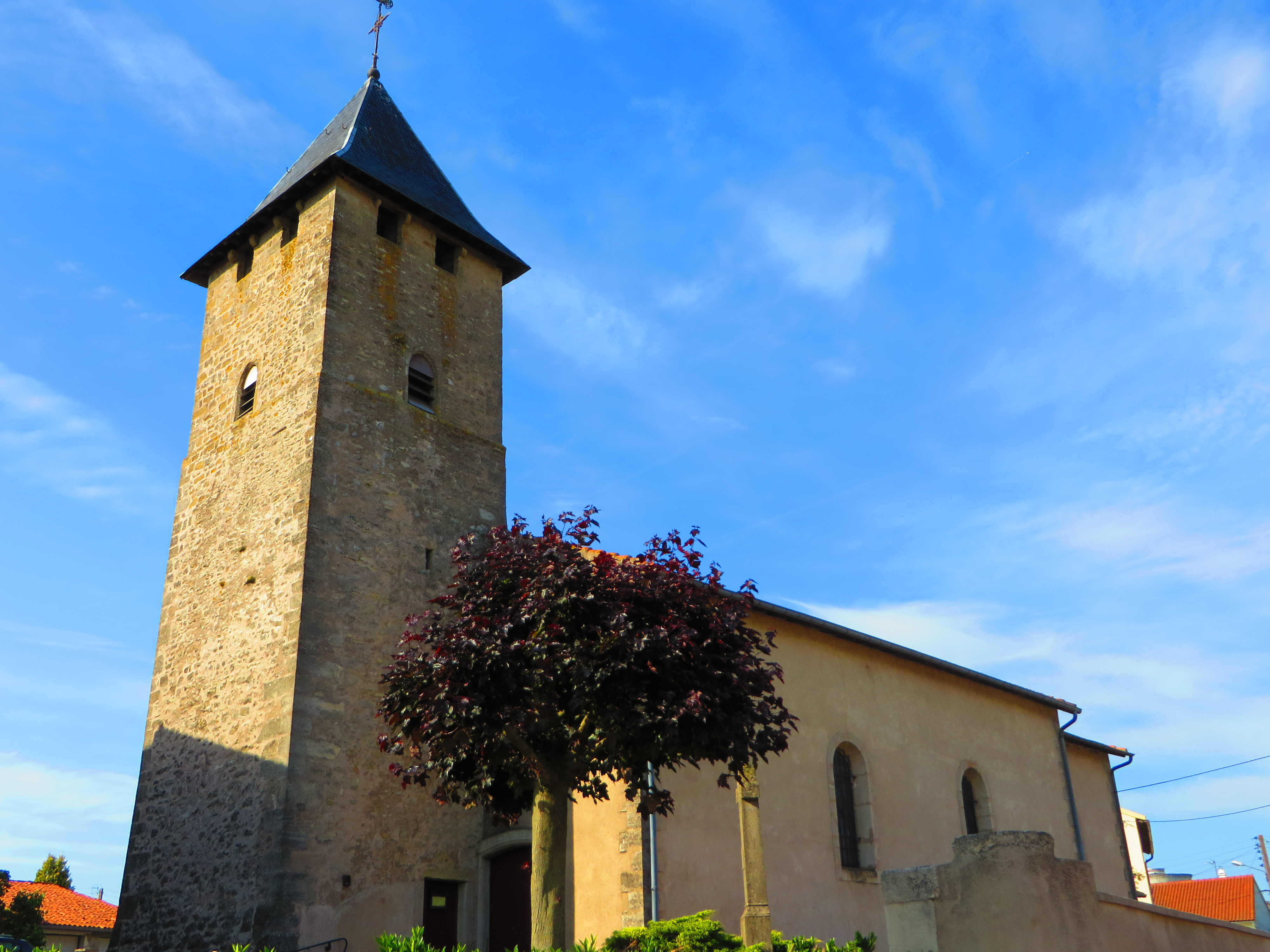 Arraincourt eglise